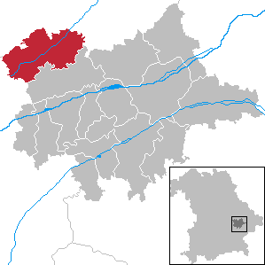 Mengkofen in Bavaria - District Dingolfing-Landau